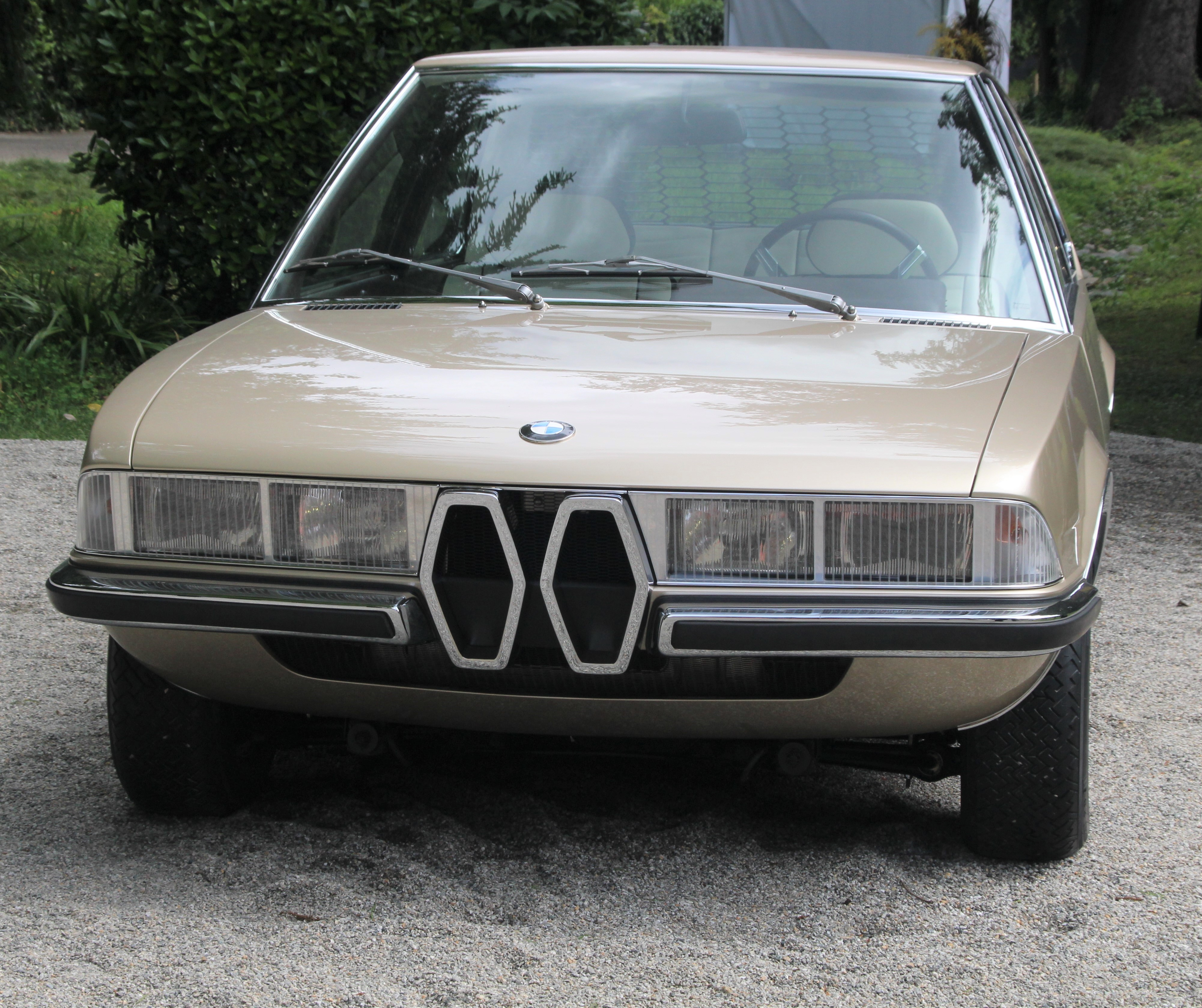 Studie von Bertone 1970 (BMW-Nachbau 2019)